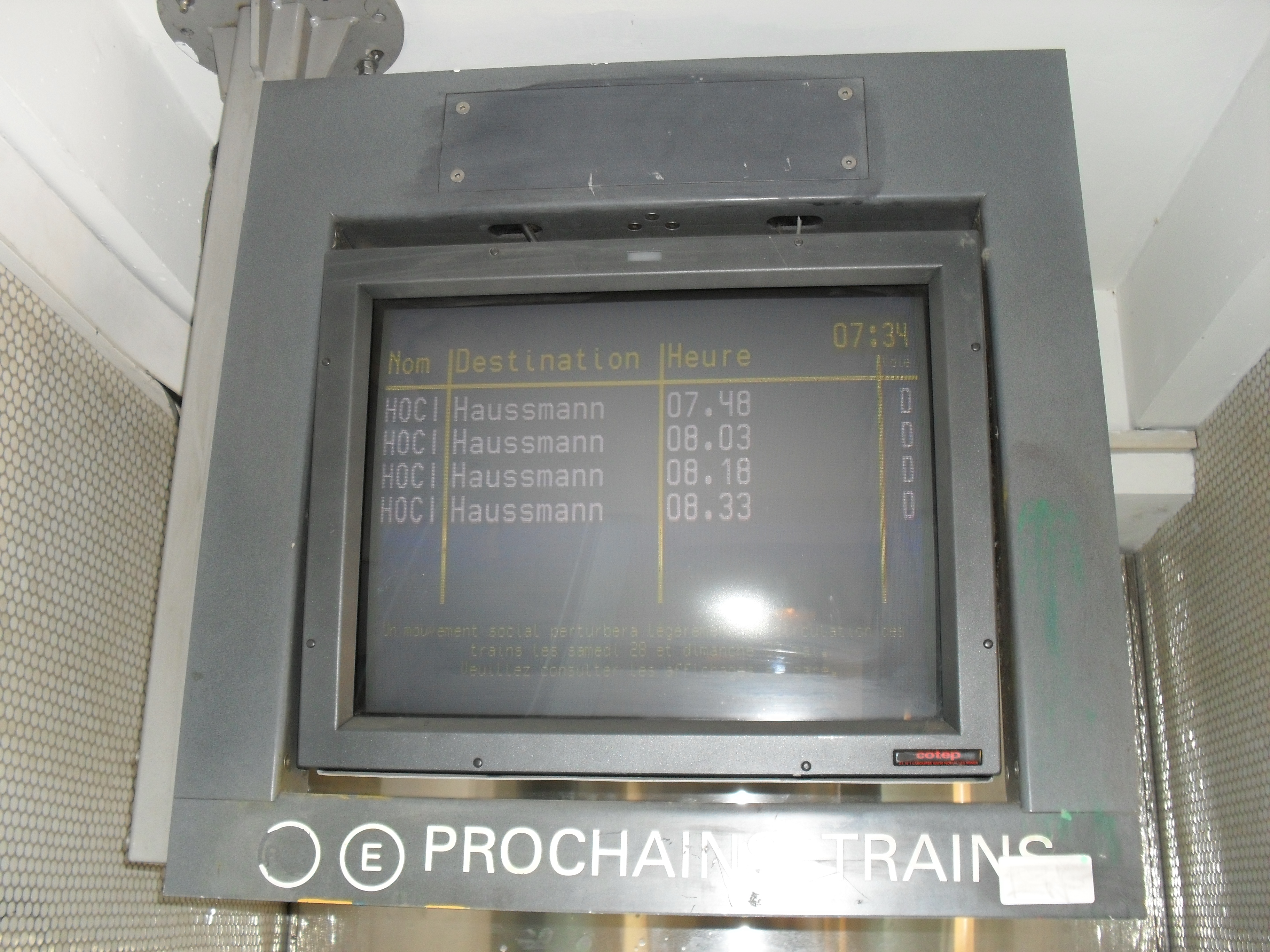 RER E - Gare du Chénay-Gagny